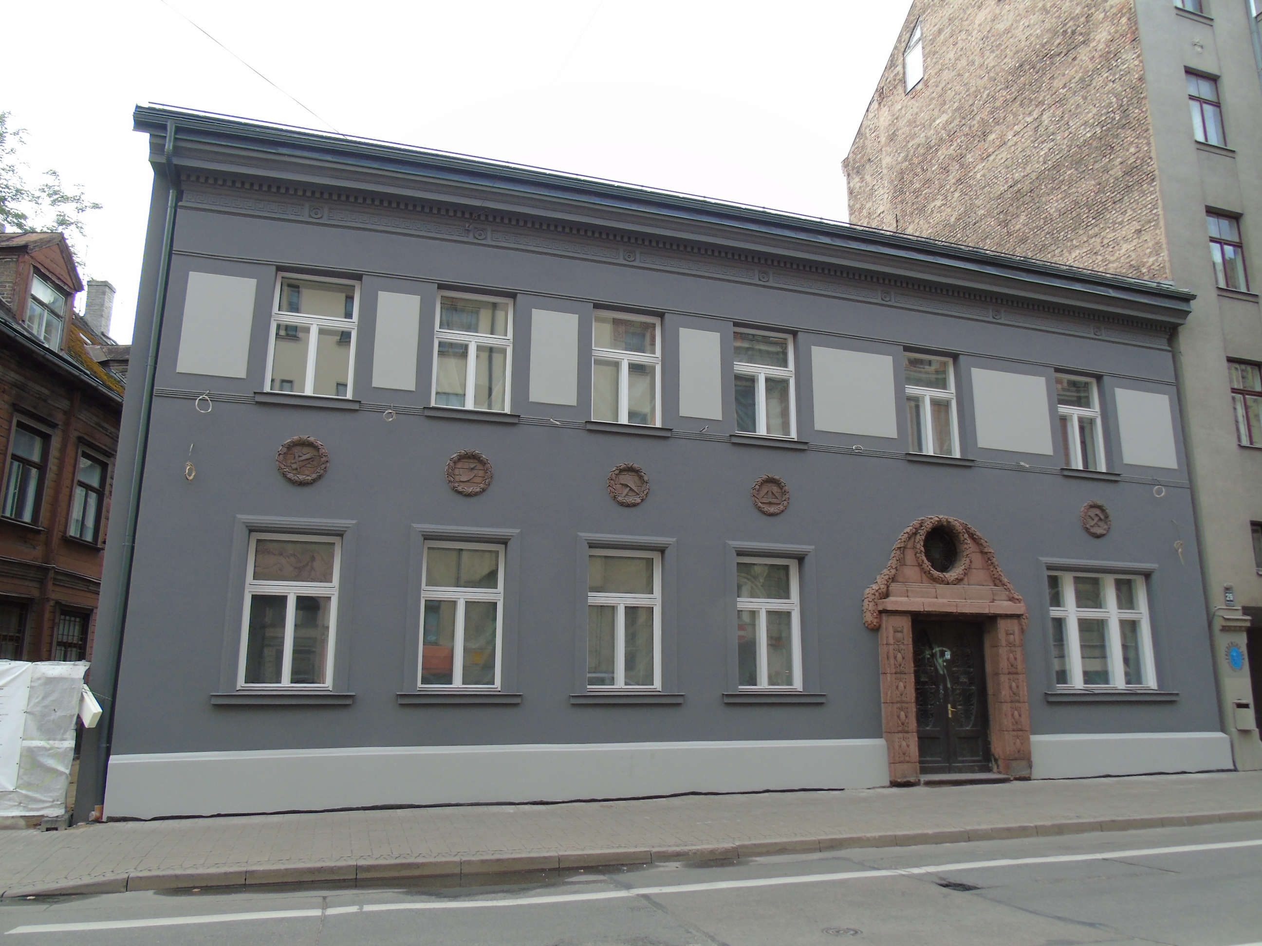 Dzīvojamā ēka, Rīga, Lāčplēša iela 28